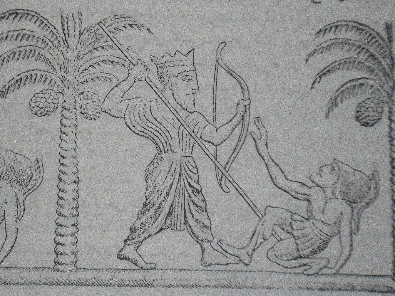 جنگجوی مادی در لباس هخامنشی، جنگجوی یونانی را مغلوب کرده. تصویر از روی مهر استوانه‌ای قرن ۴ تا ۵ پیش از میلاد.